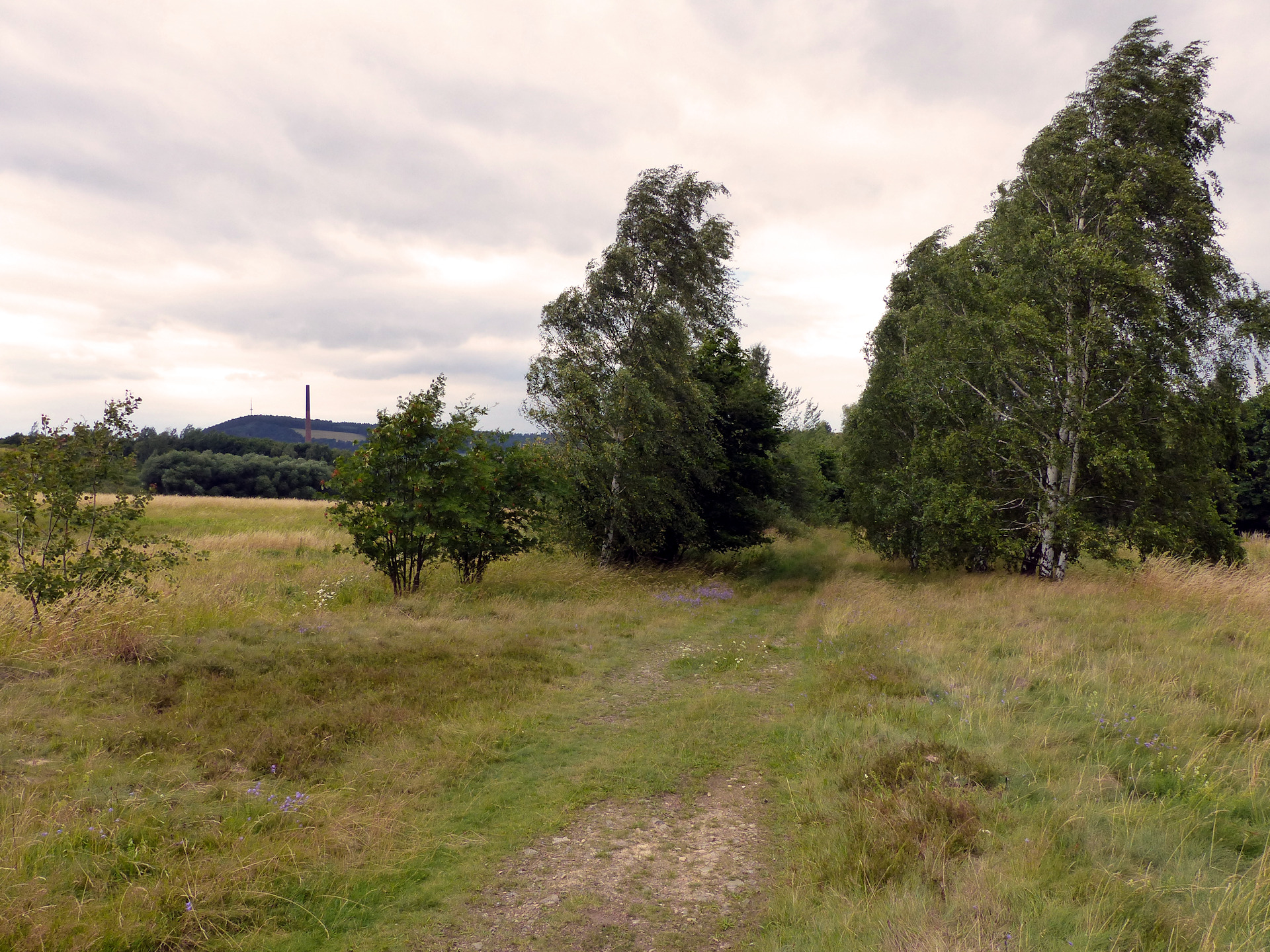 Naturschutzgebiet Röseckenbach, Blick Richtung Westen.